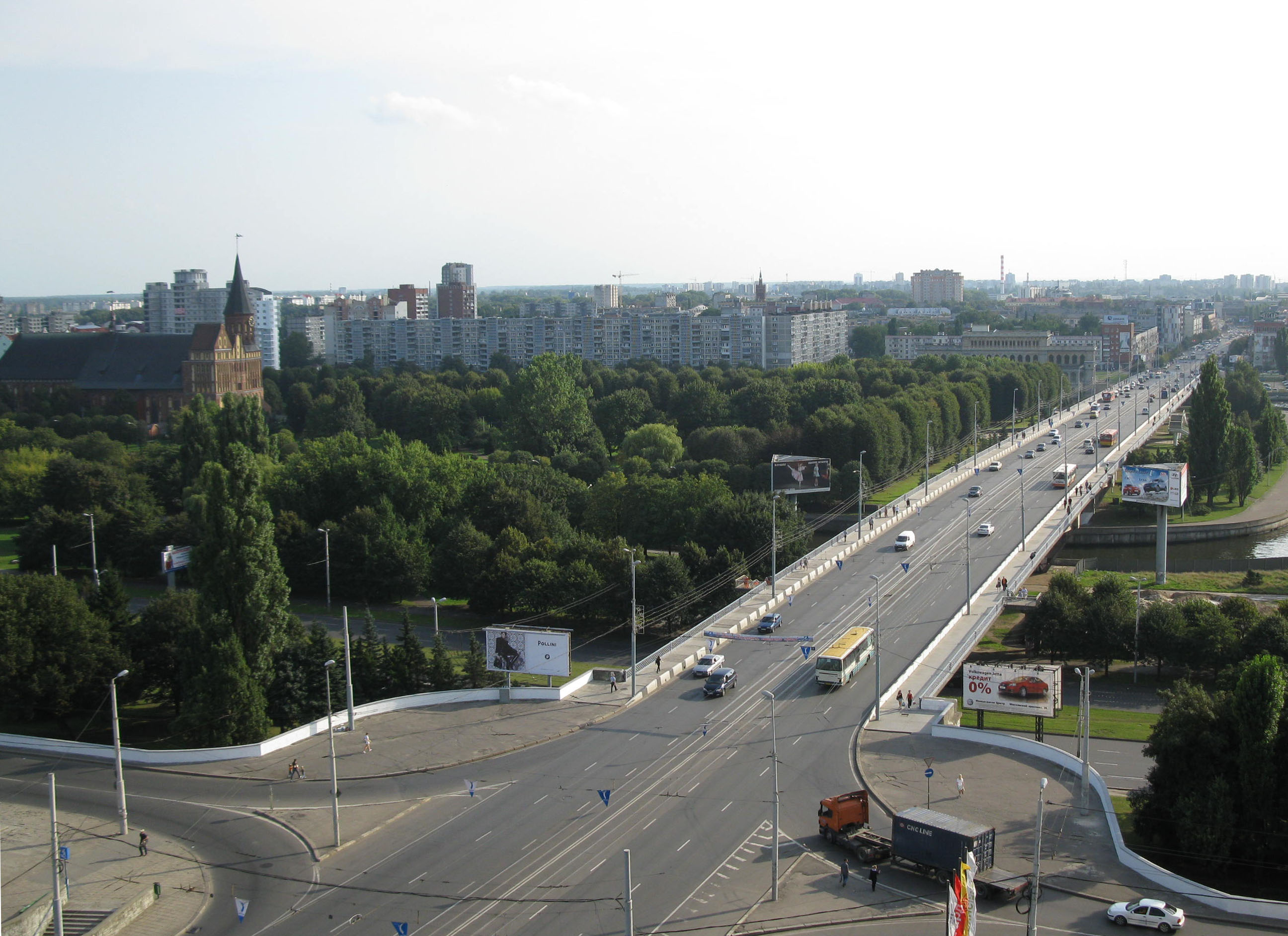 Вид на эстакадный мост в Калининграде с ТРК "Плаза"